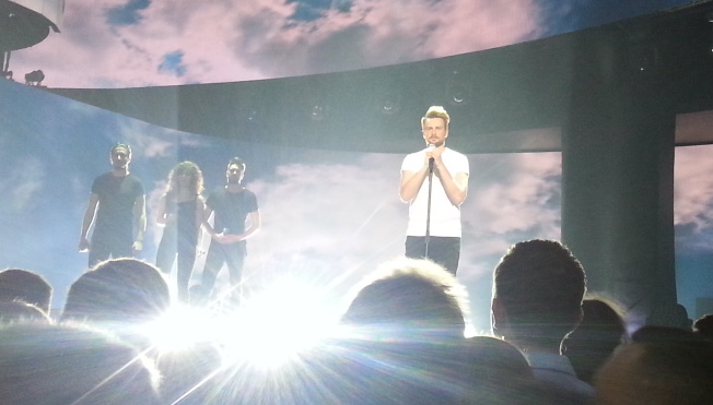 Polski piosenkarz Martin Fitch podczas występu w krajowych eliminacji do 62. Konkursu Piosenki Eurowizji.